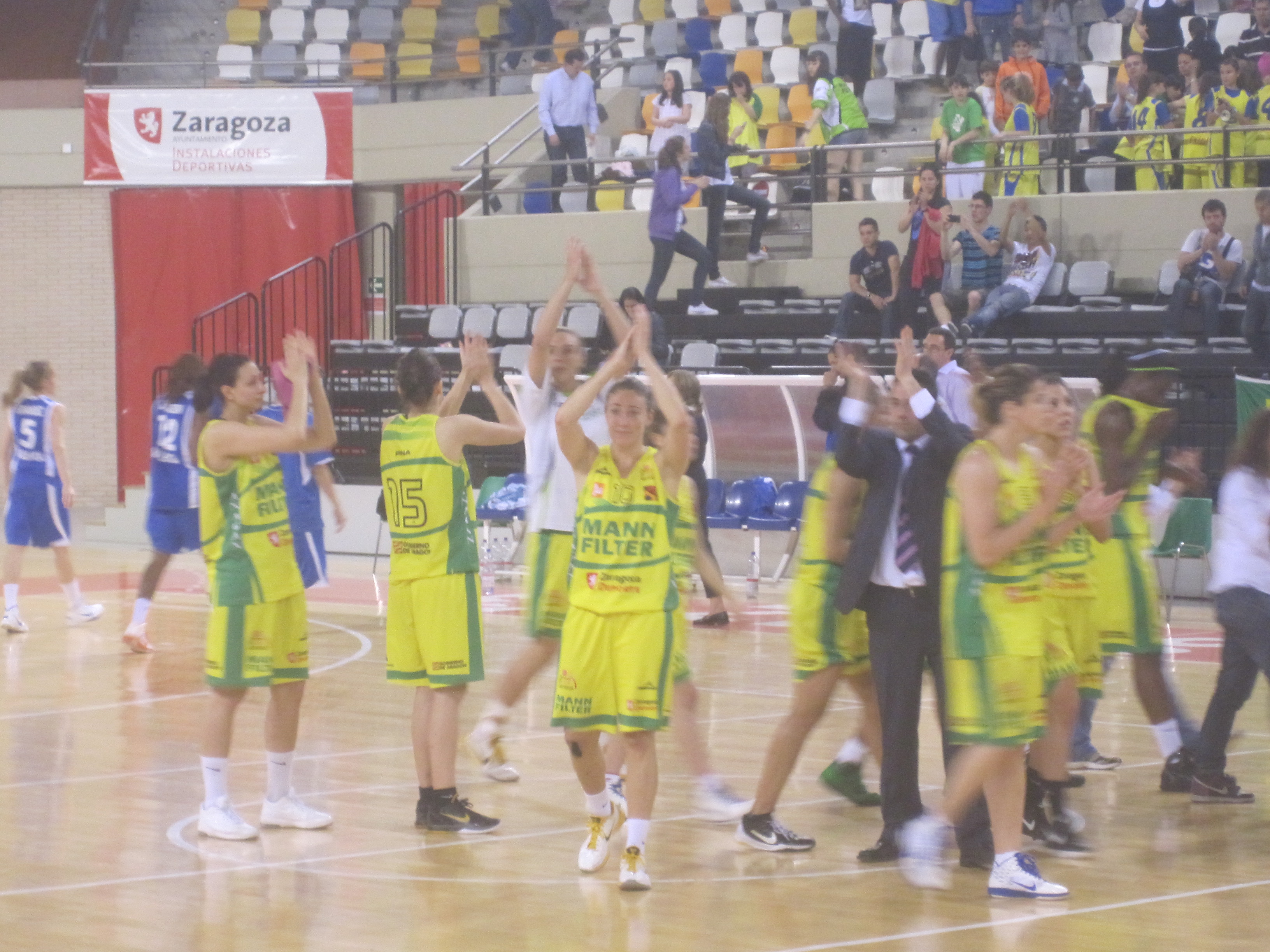 Las jugadoras del Mann Filter agradeciendo el apoyo mostrado.